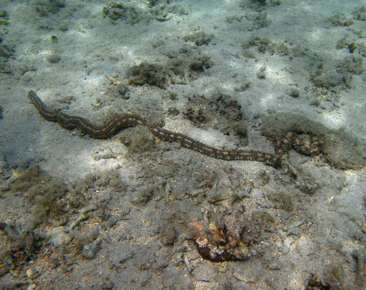 Un cordon mauresque (Synapta maculata) à la Réunion.